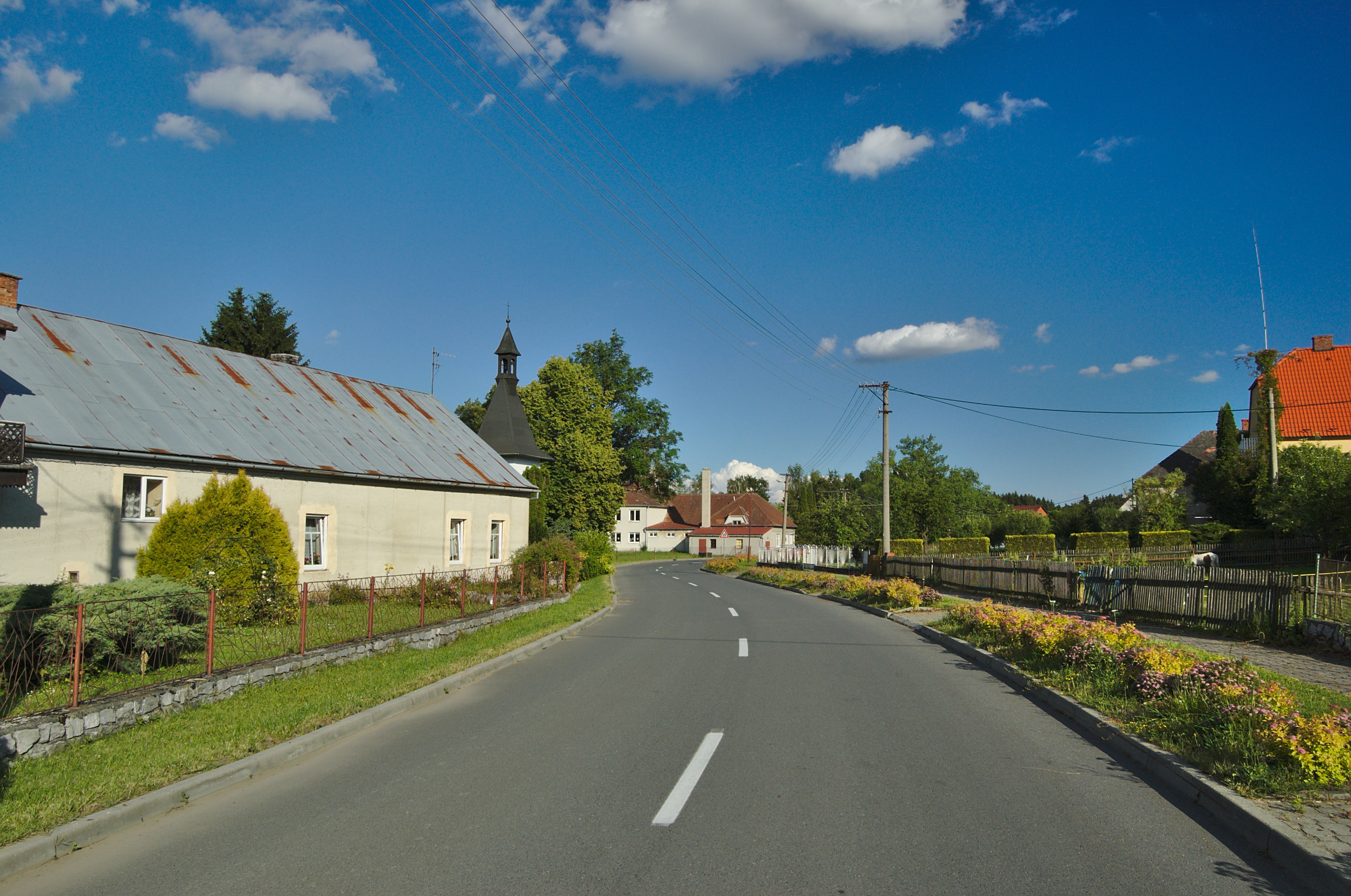 Zvonice, Niva, okres Prostějov